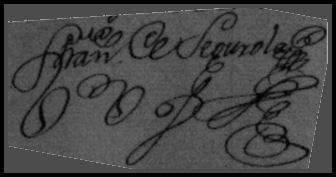 Fotografía de la firma de Francisco de Segurola y Oliden tomada de un expediente del Archivo General de Indias (julio de 1773).